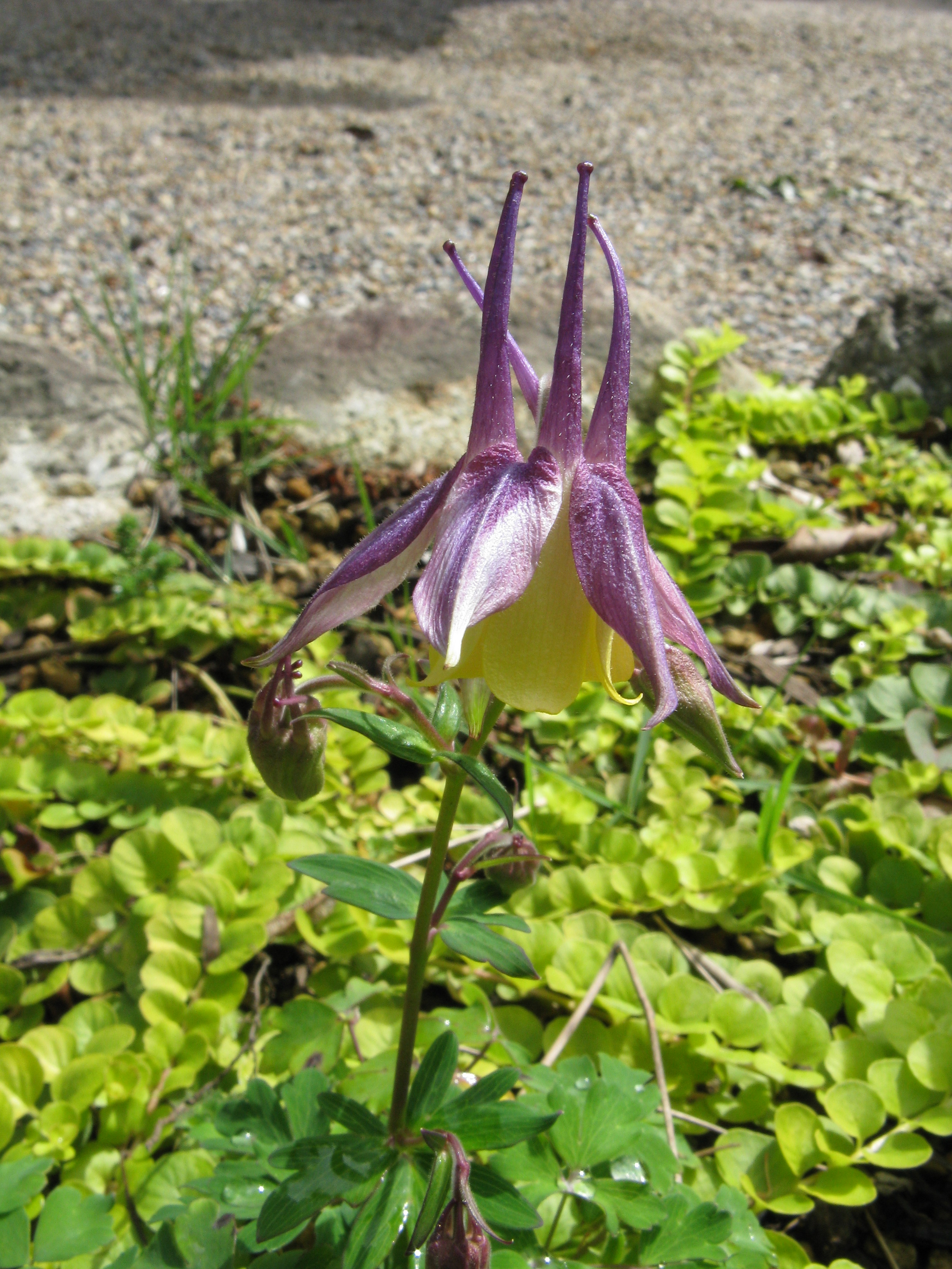 Scientific name Aquilegia x maruyamana